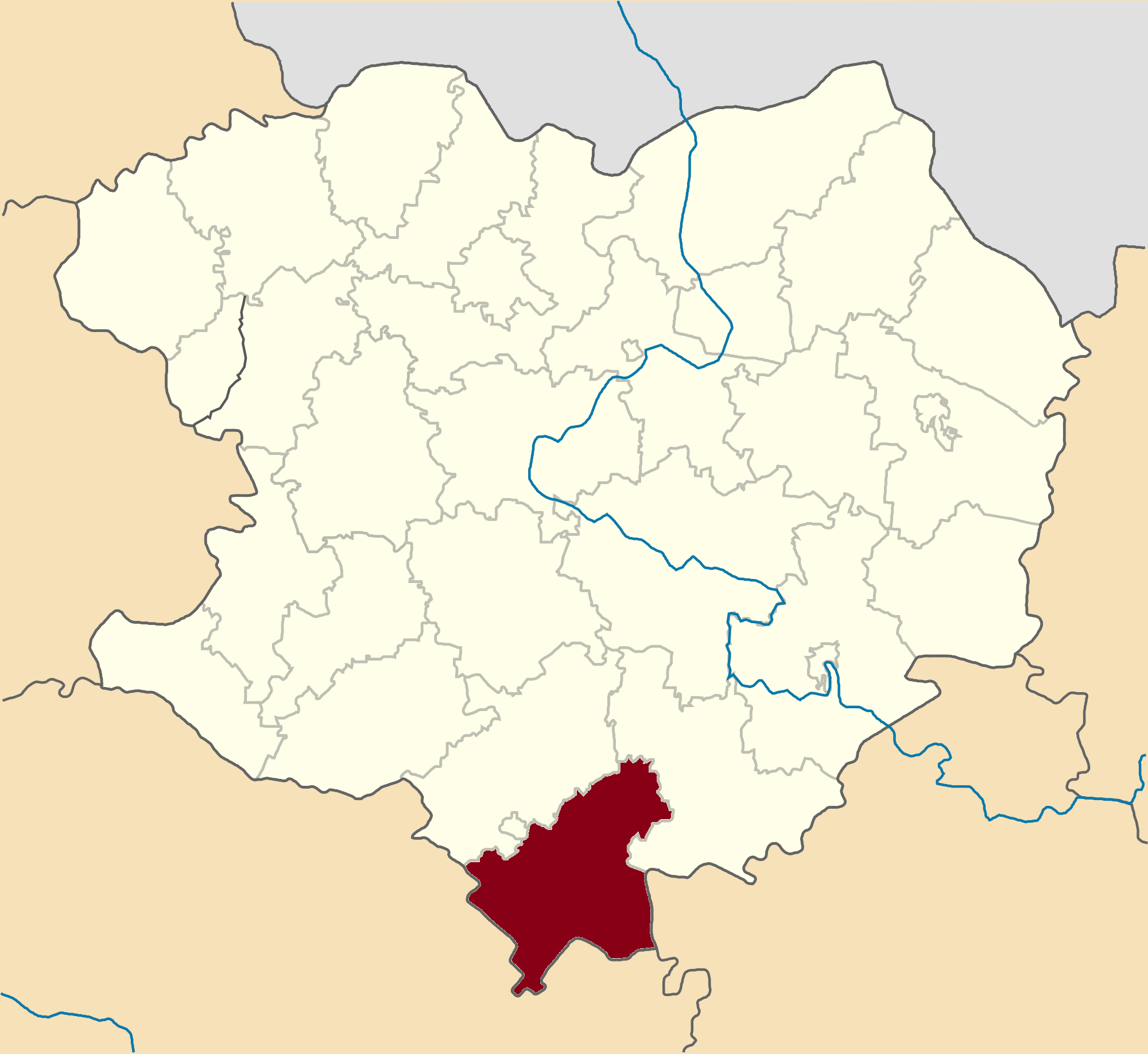 Blyzniukivskyi-Raion map